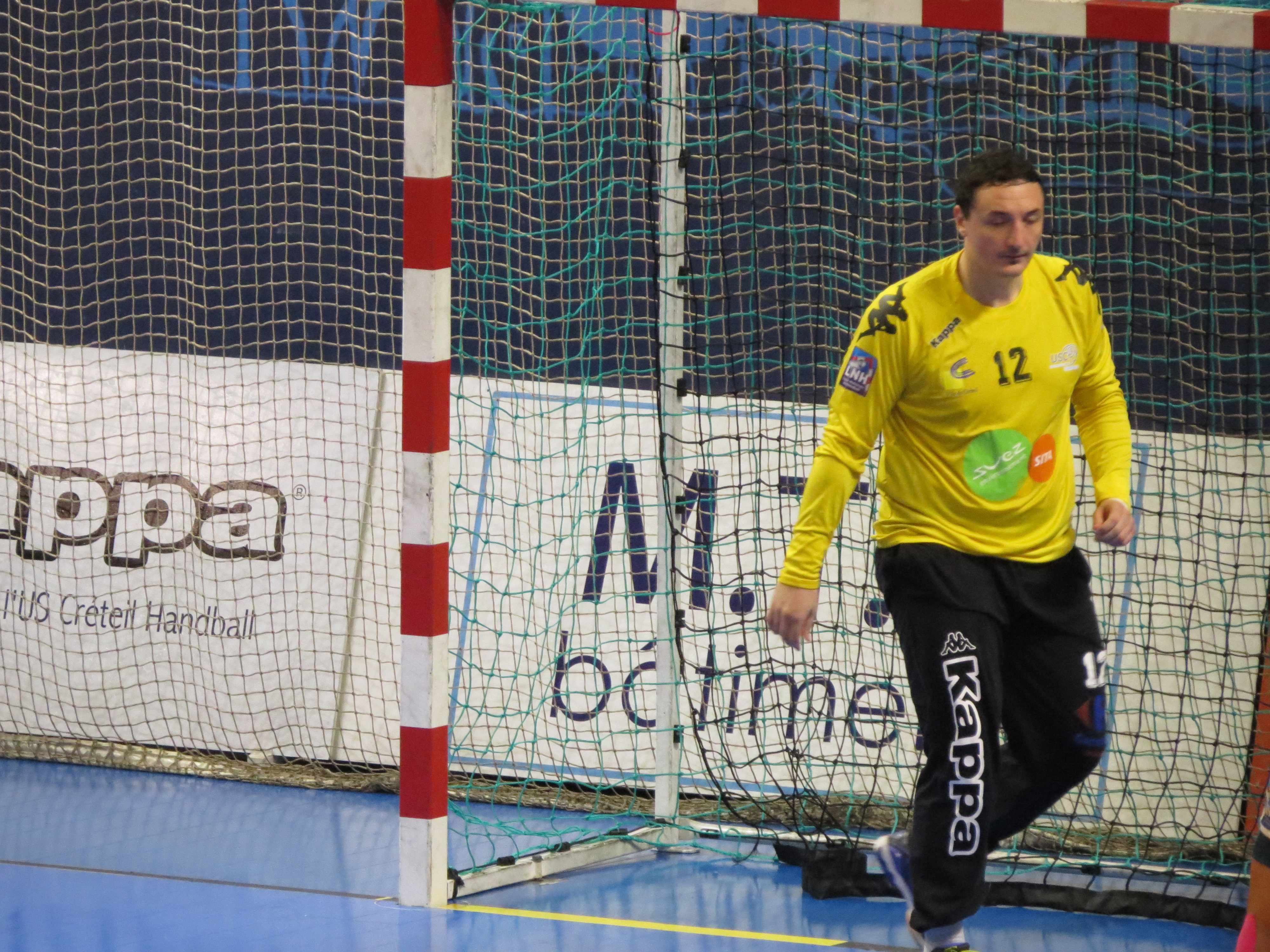 Créteil - Chambéry, LNH, 22 Octobre 2014 Victoire 35-31 de Créteil 12 RISTOVSKI Borko